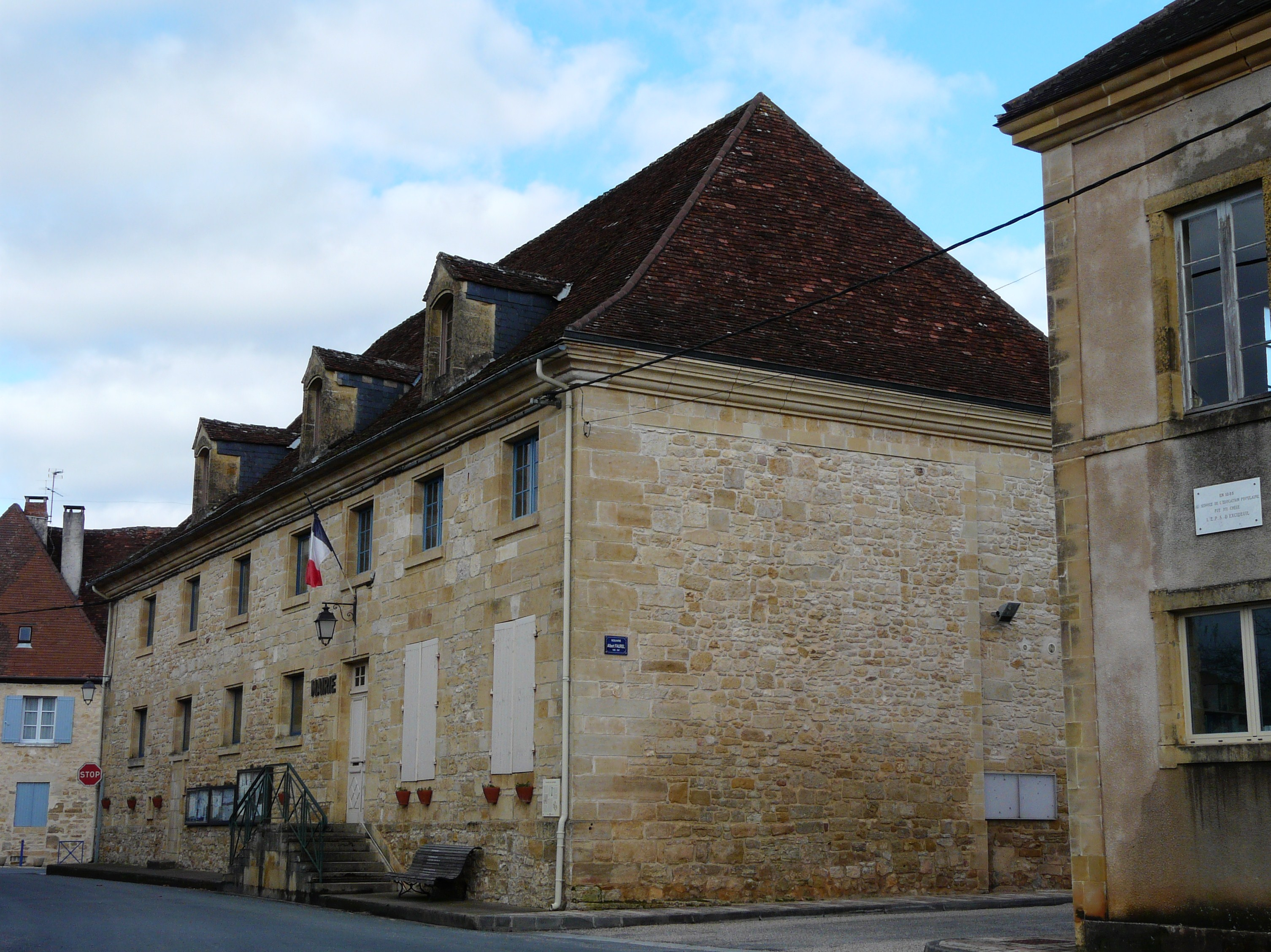 La mairie d'Excideuil, Dordogne, France